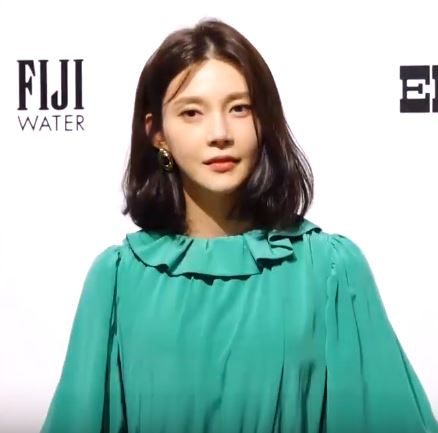 차예련, 소유와 효민이 17일 오후 서울시 강남구 청담동 분더샵에서 열린 한 브랜드의 포토행사에 참석했다.